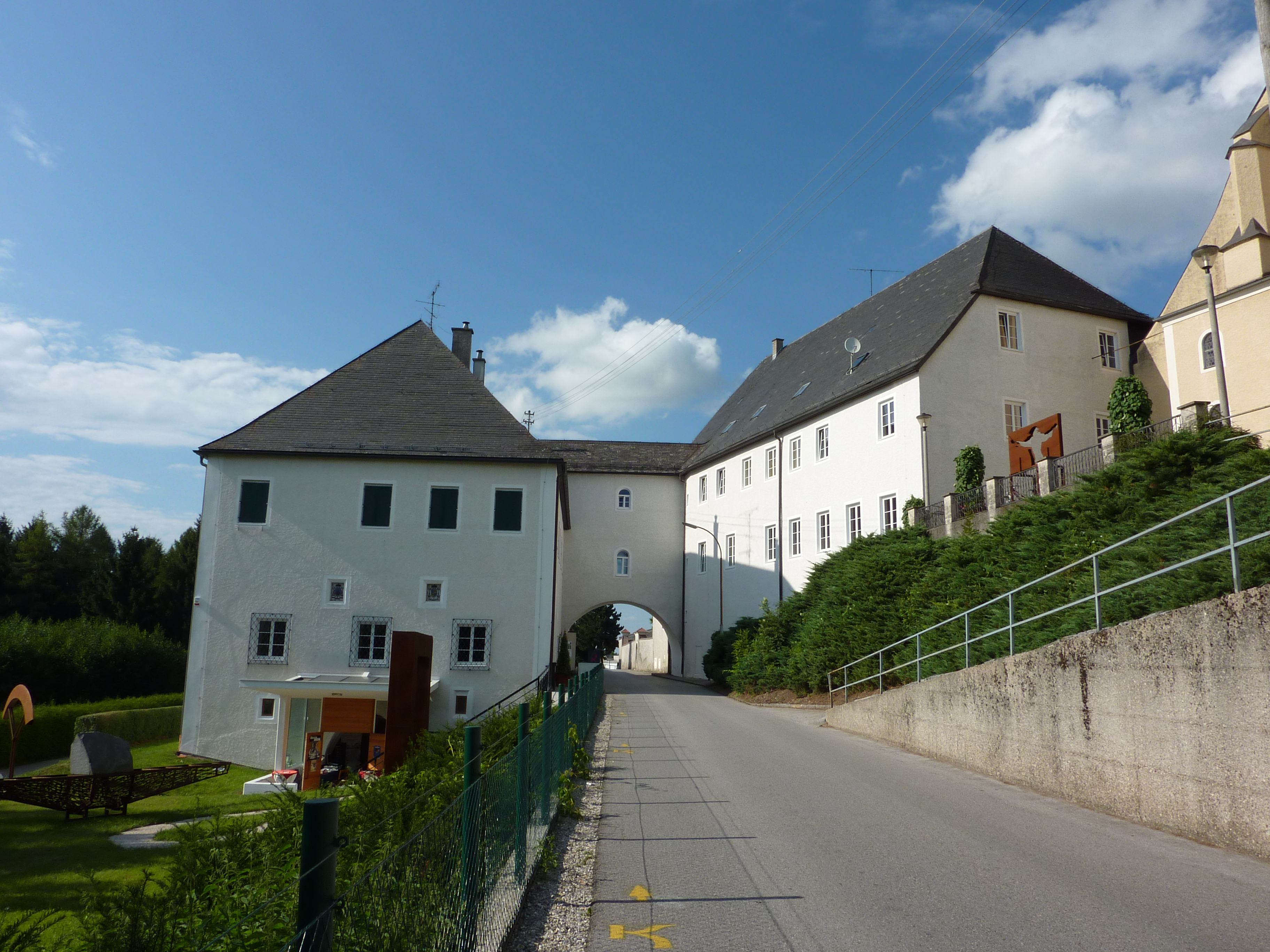 Pfarrhof (Propstei) mit Verbindungsgang in Mattighofen in Oberösterreich